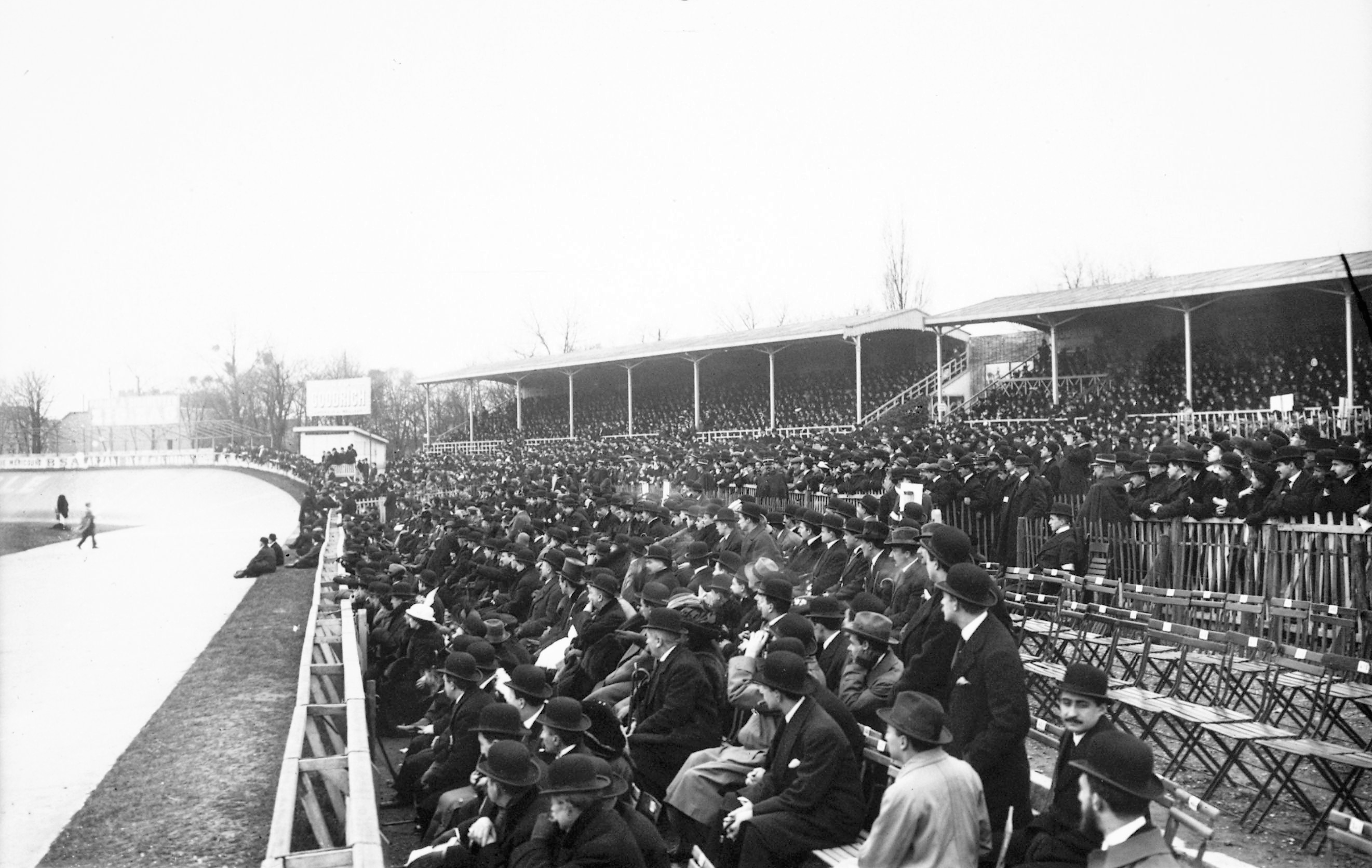 Vue des tribunes du Parc des Princes en 1913 à l'occasion d'un match international de rugby à XV : France-Galles, du 27 février 1913. Ce cliché de 1913 ne porte pas de mention sur l'identité du photographe mais seulement le nom de l'agence de photo : "Rol". C'est donc un cliché dit "anonyme" qui tombe dans le domaine public en France 70 ans après sa publication. Voir aussi Conditions d'utilisations des clichés de